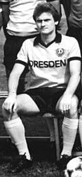 Title: Mannschaftsfoto Dynamo Dresden, Europapokal-Teilnehmer Factual corrections and alternative descriptions are encouraged separately from the original description. Additionally errors can be reported at this page to inform the Bundesarchiv. Original historic description: ADN-ZB-Hiekel-9.1.86-kb-Dresden: Fußball. Auslosung. Dynamo Dresden tritt im Viertelfinale des Fußball-Europacups der Pokalsieger auf BRD Pokalgewinner Bayer Uerdingen. Die Begegnung findet am 5. und 19.3. statt. Obere Reihe: Kapitän Hans-Jürgen Dörner, Roland Rüster, Sven Förster, Andreas Trautmann, Ralf Minge, Steffen büttner und Ulf Kirsten (v.l.). Mittlere Reihe: Assistenztrainer Dieter Riedel, Matthias Däschner, Uwe Kuhl, Bernd Jakubowski, Jens Ramme, Torsten Mitschow und Trainer Klaus Sammer (v.l.). Sitzend: Frank Lippmann, Jörg Stübner, Reinhard Häfner und Hans-Uwe Pilz (v.l.).